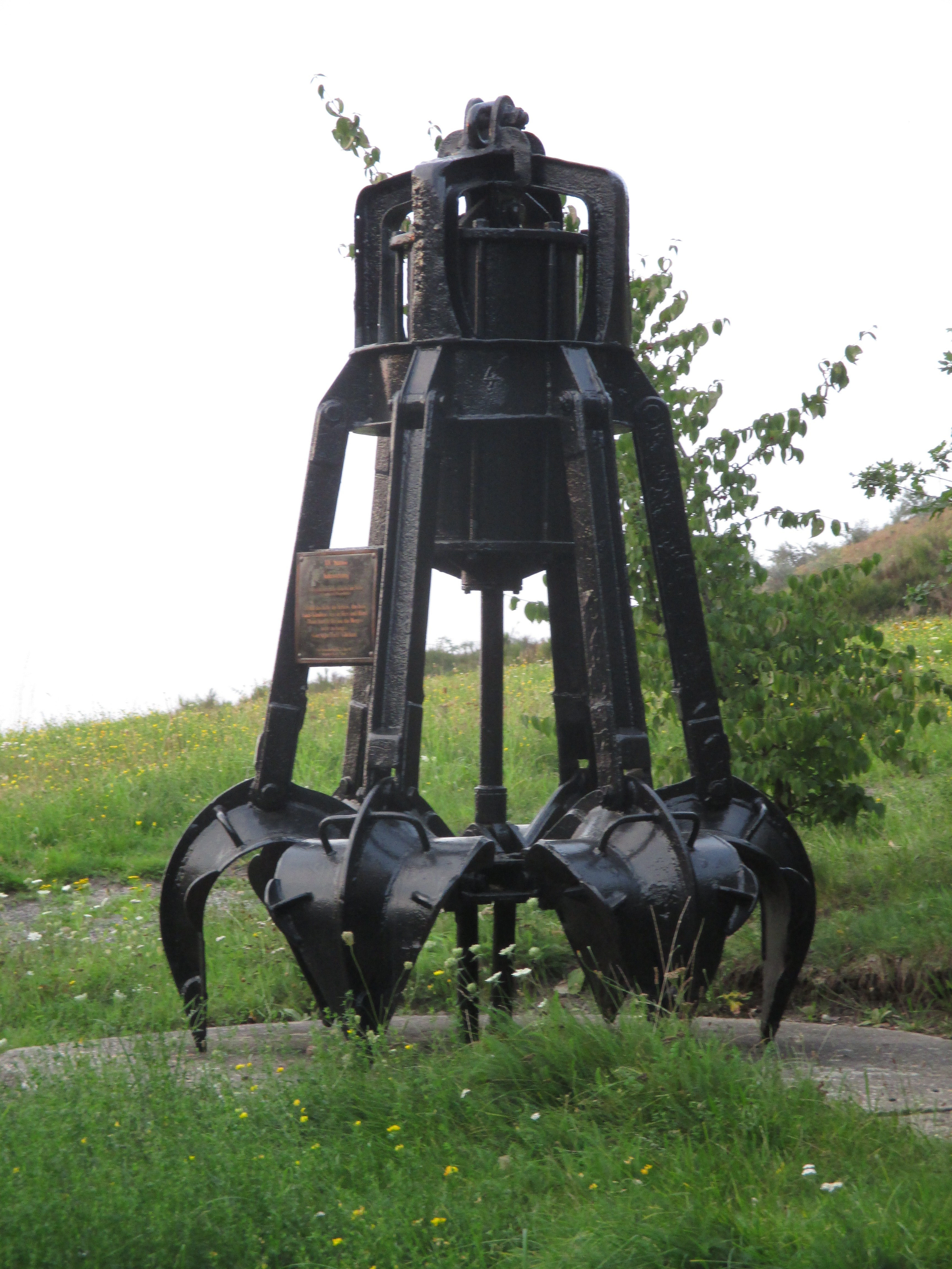 Station 15 des Bergbaukreuzweges an der Halde Haniel in Bottrop.